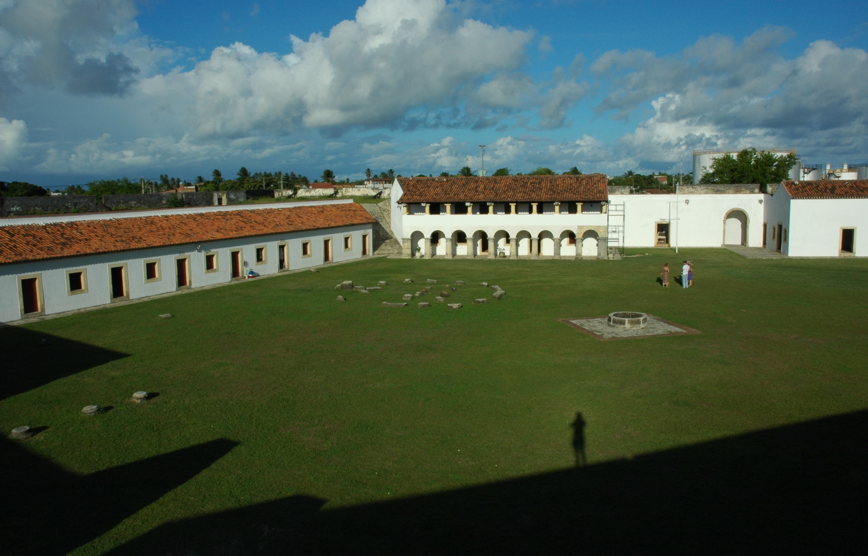 Panorâmica da Fortaleza de Santa Catarina